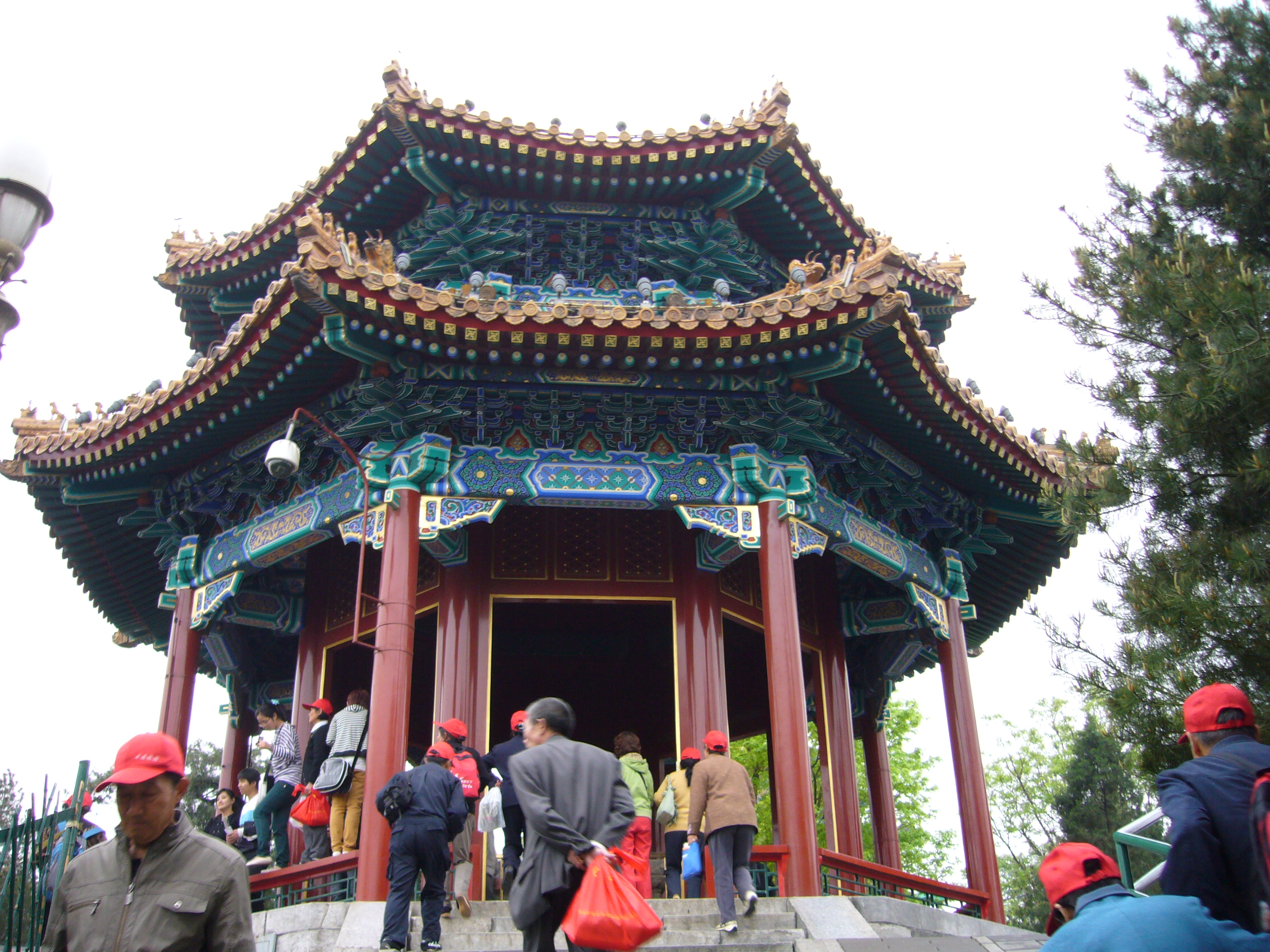 Wanchun tempel in Beijing, vanwaar men uitzicht heeft op de Verboden Stad